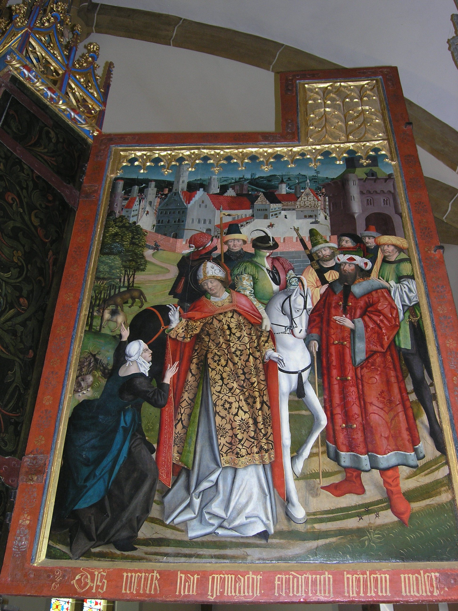 Evangelische Stadtkirche St. Blasius in Bopfingen, einer Stadt im Ostalbkreis (Baden-Württemberg), Flügelaltar von Friedrich Herlin (Tafelbilder), von 1472, Außenseite linke Tafel. Darstellung: St. Blasius als Bischof